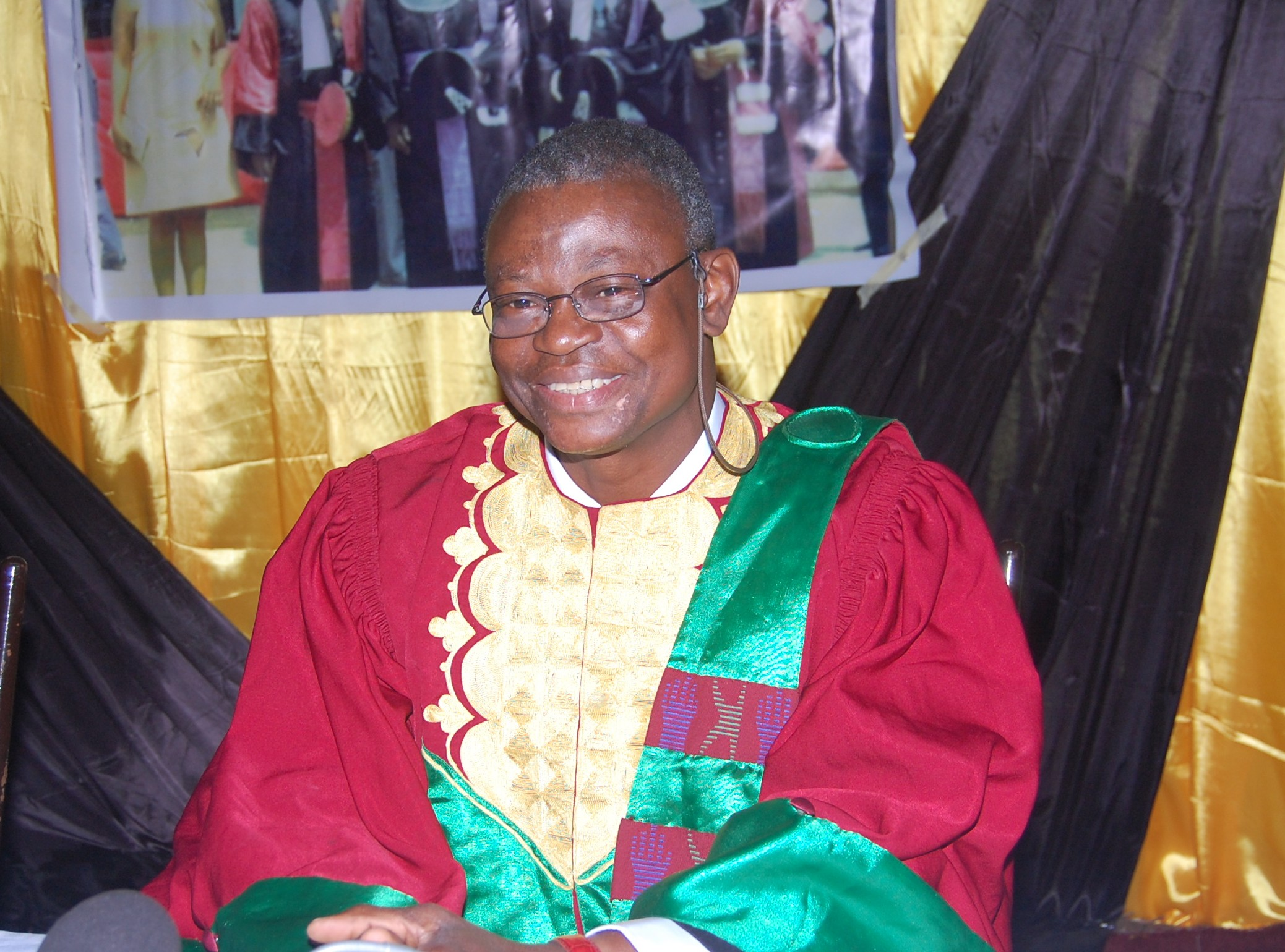 Recteur de l'Université d'Abomey-Calavi